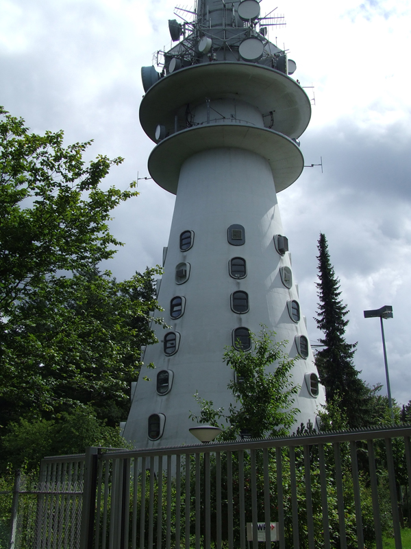 Arbeitsräume des Sender Donnersberg